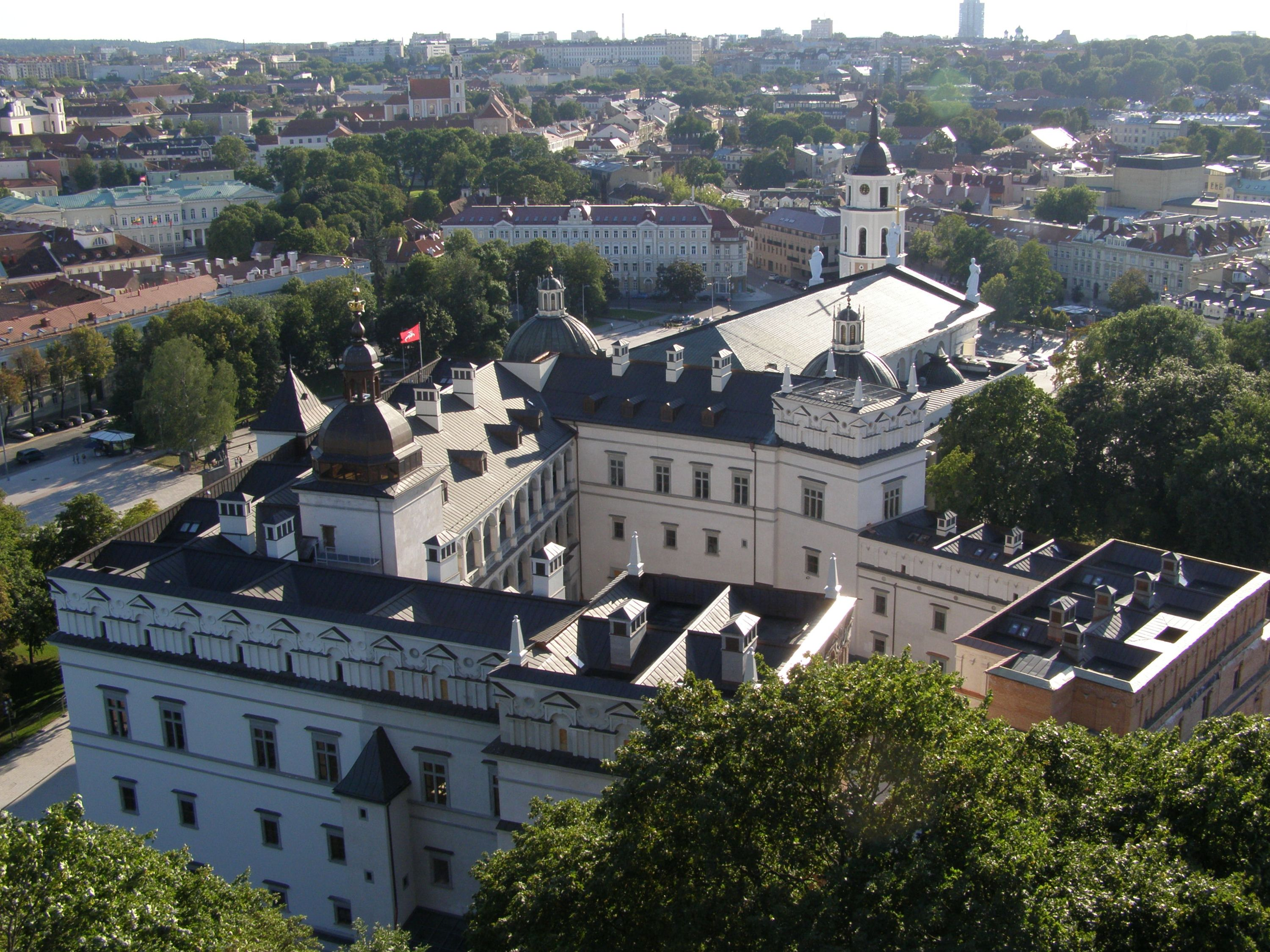 Zamek Dolny w Wilnie